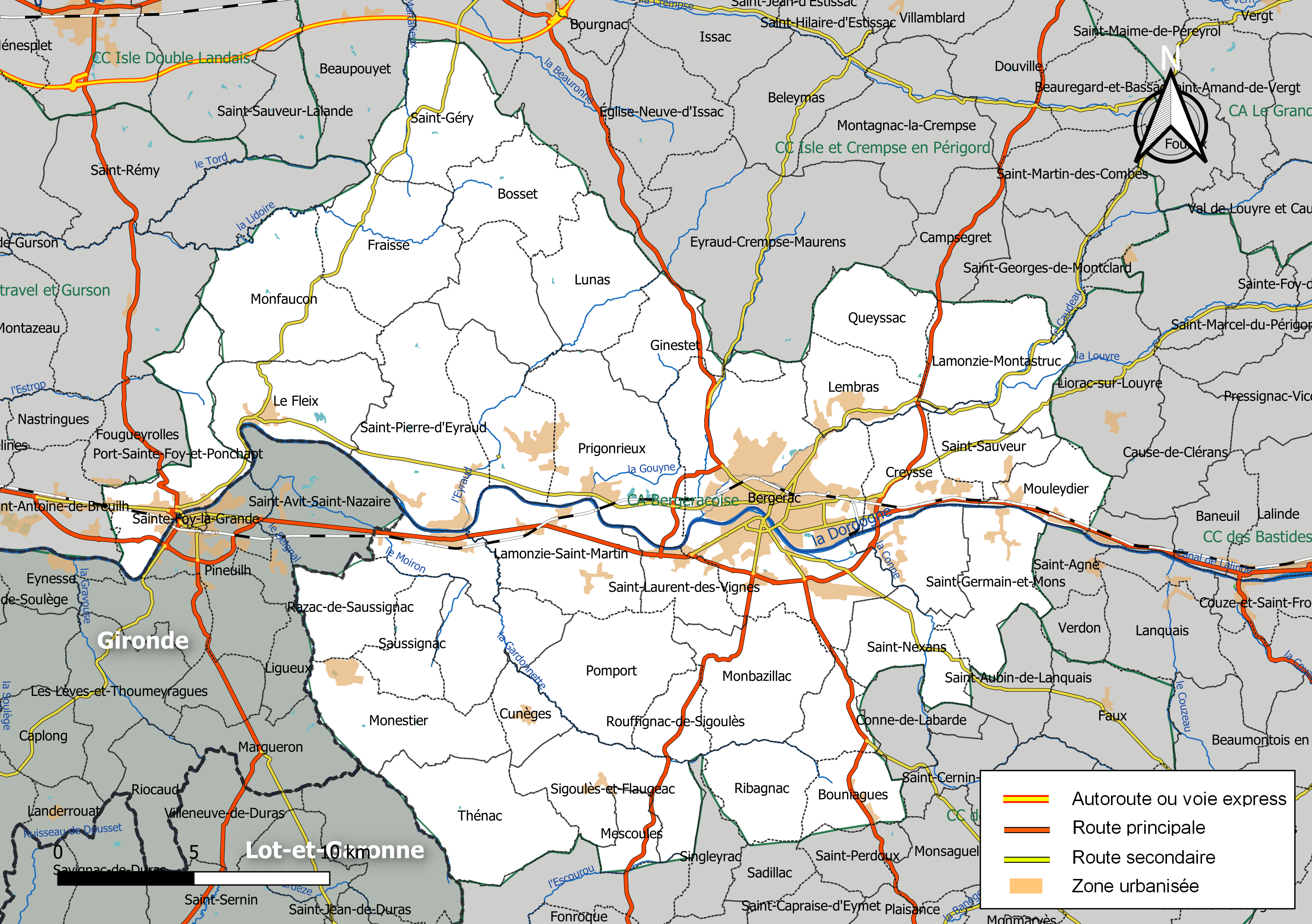 Carte géographique de la Communauté d'agglomération Bergeracoise, département de la Dordogne, France. Composition au 1er janvier 2019.